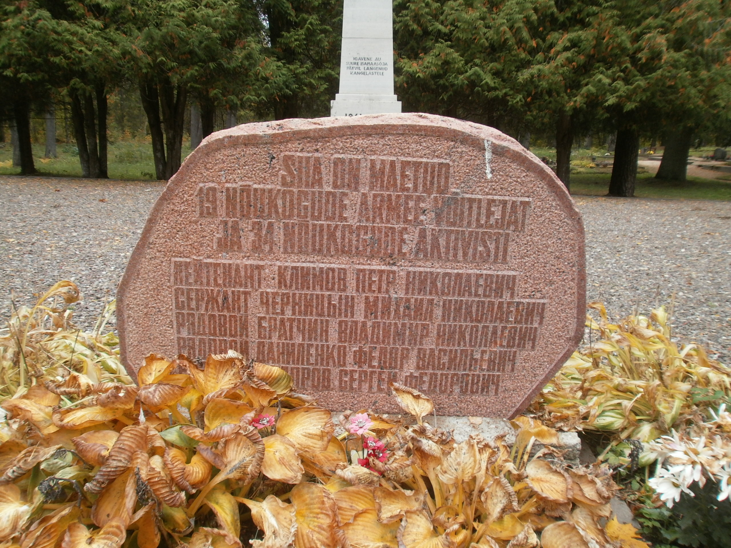 Mälestusmärk on pühendatud langenud nõukogude sõduritele ja aktivistidele. Vaade lõunasuunast.